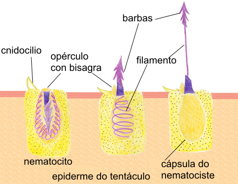 descarga dun nematociste